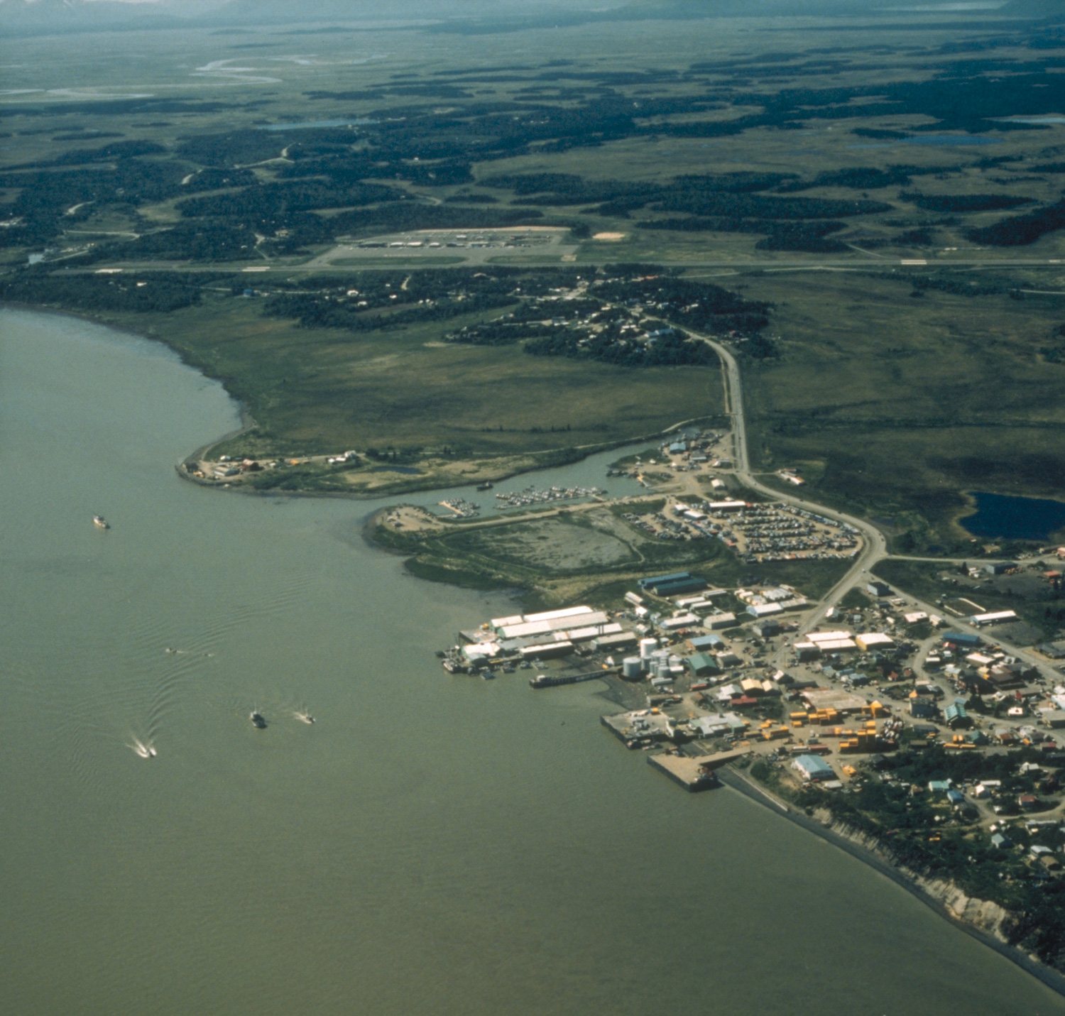 Aerial view of Dillingham, Alaska.